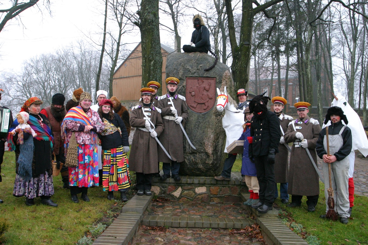 Šyvio šokdinimo papročio dalyviai, Gražiškiai, Vilkaviškio raj., Lietuva.